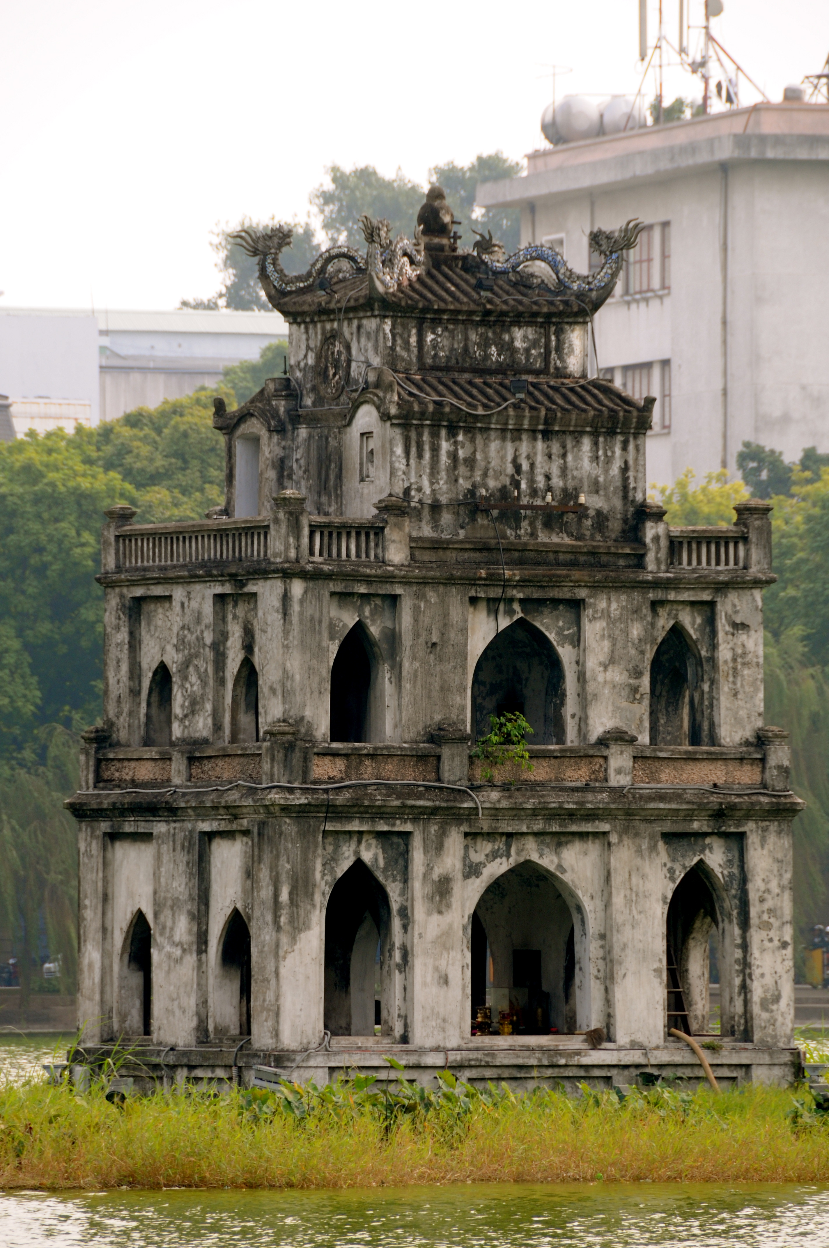 Tháp Rùa.